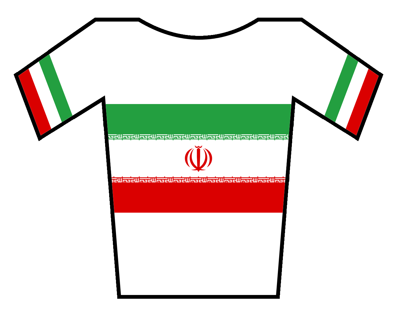 Maillot de champion d'Iran.